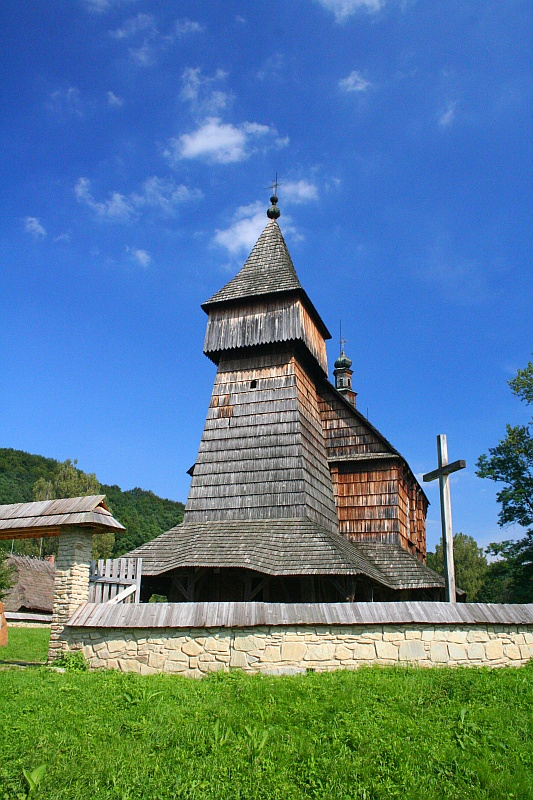 Kościół z Bączala wybudowany w 1667r. aktualnie znajduje sie w Skansenie w Sanoku